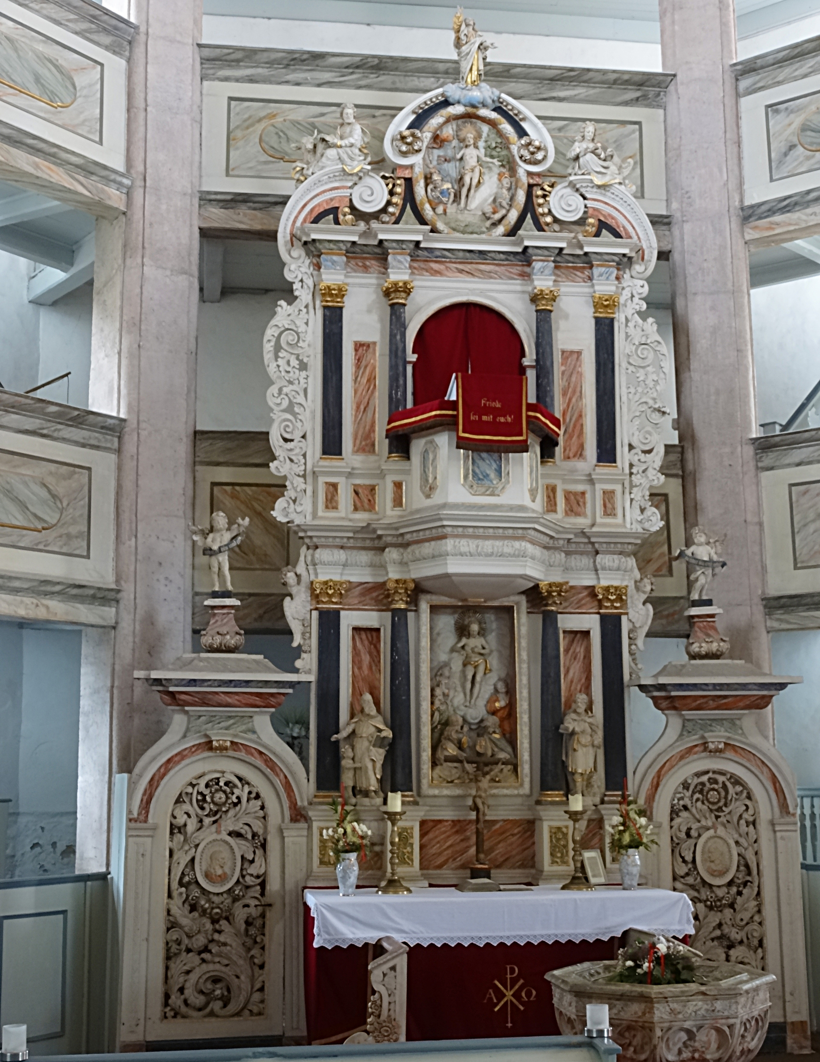 Kanzelaltar von Wilhelm Michaelis (1695) in St. Cyriaci und Nicolai, Schwenda